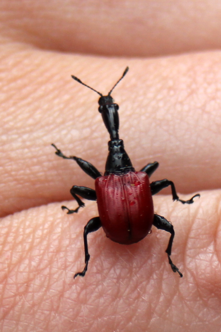 Trachelophorus giraffa in Andasibe